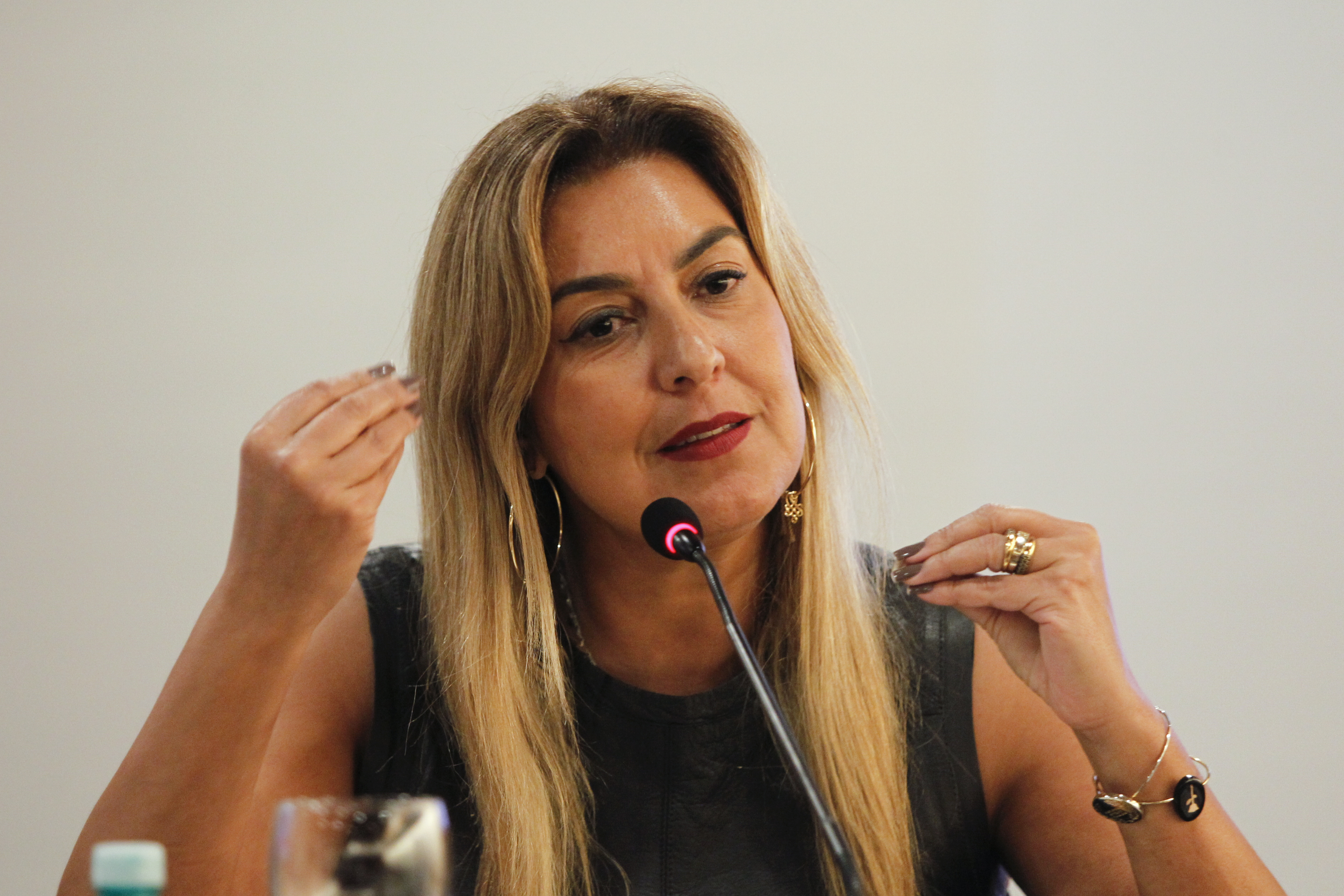 Seminário "Mulheres em Pauta: Avanços e Desafios Femininos na Nova Década" Como parte da agenda de eventos relacionados ao Dia Internacional da Mulher, em 8 de março, realizou-se o evento "Mulheres em Pauta: Avanços e Desafios Femininos na Nova Década". Para debater o tema foram convidadas mulheres de destaque no campo jurídico. Em pronunciamento, presidente da Associação dos Magistrados Brasileiros (AMB), Renata Gil. Foto: Beto Barata/Agência Senado